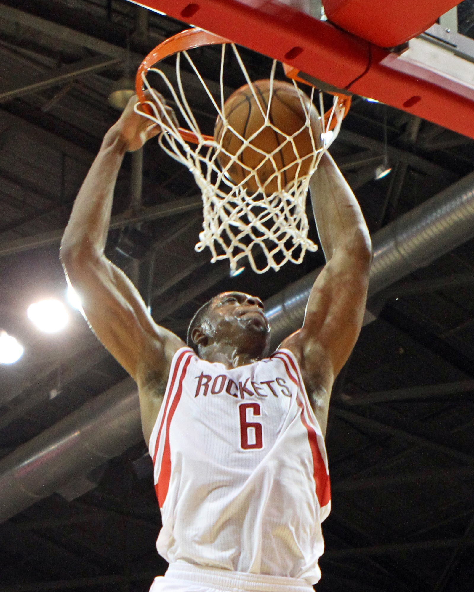 Terrence Jones dunkin